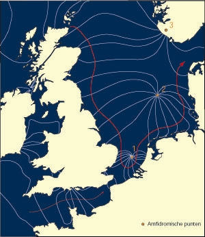 Een kaart met getijdelijnen en amfidromische punten in de Noordzee.